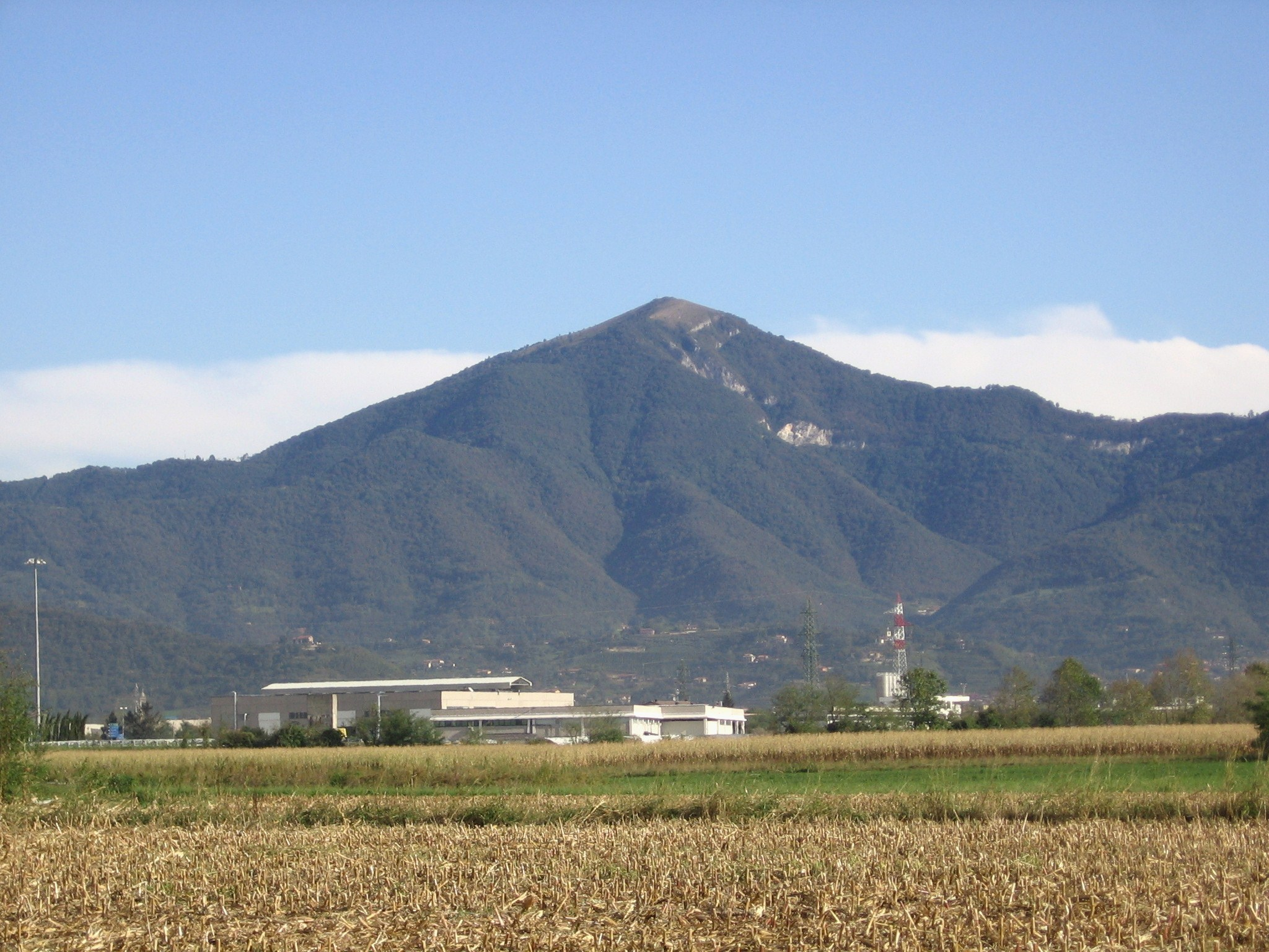 Monte Misma, Bergamo, Italia